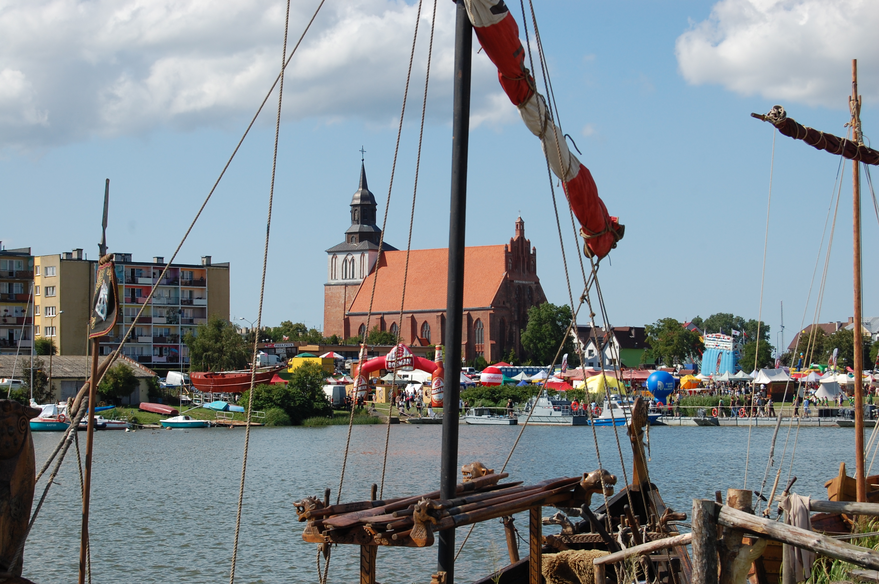 XV Festiwal Słowian i Wikingów w 2009 roku